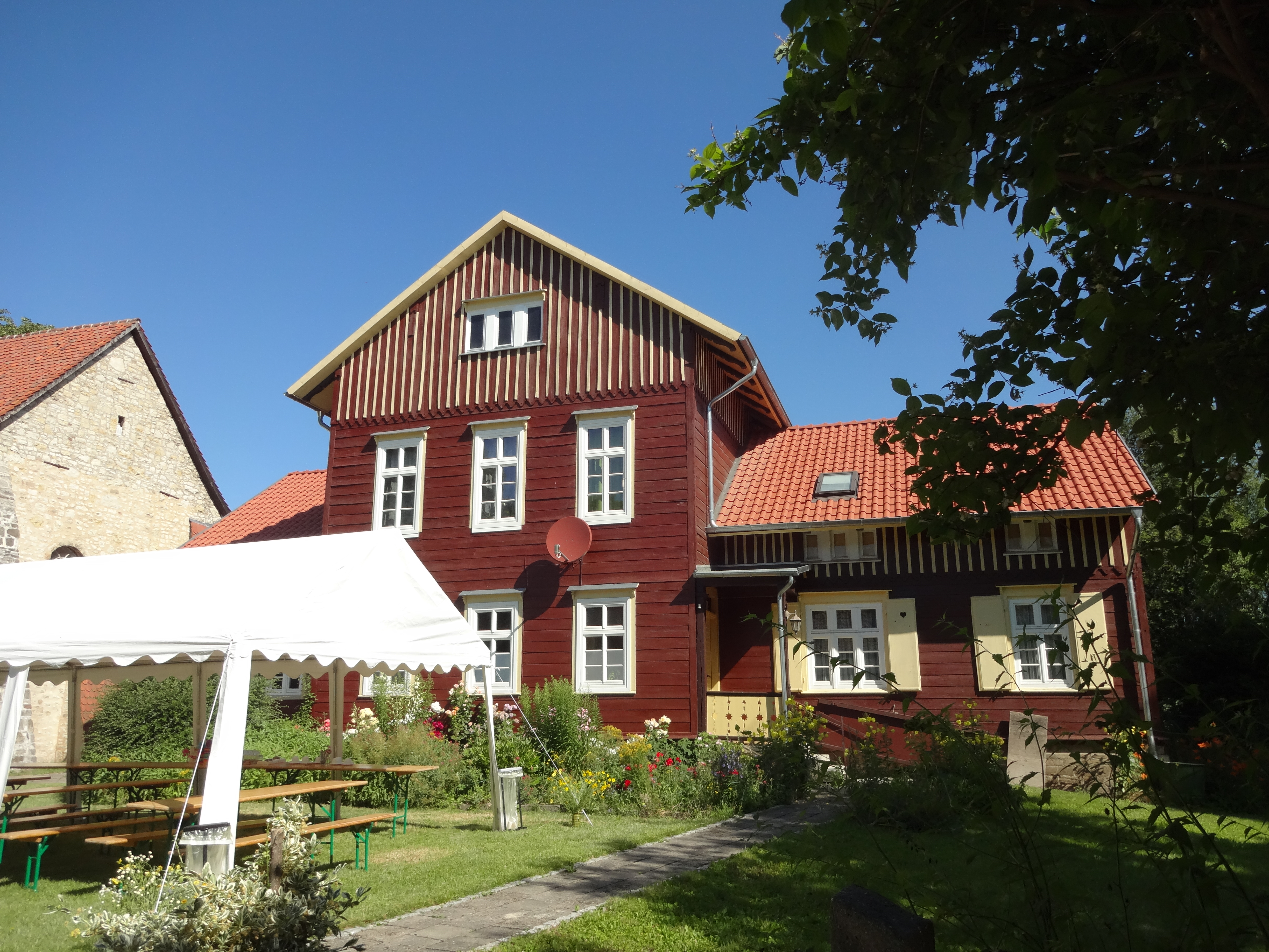 denkmalgeschütztes Pfarrhaus in der Hauptstraße 11 in Langeln, in der Gemeinde Nordharz